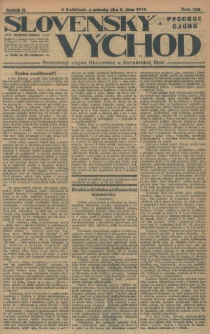 Titulný list periodika Slovenský Východ, ktorý vychádzal na Slovensku od r. 1919.